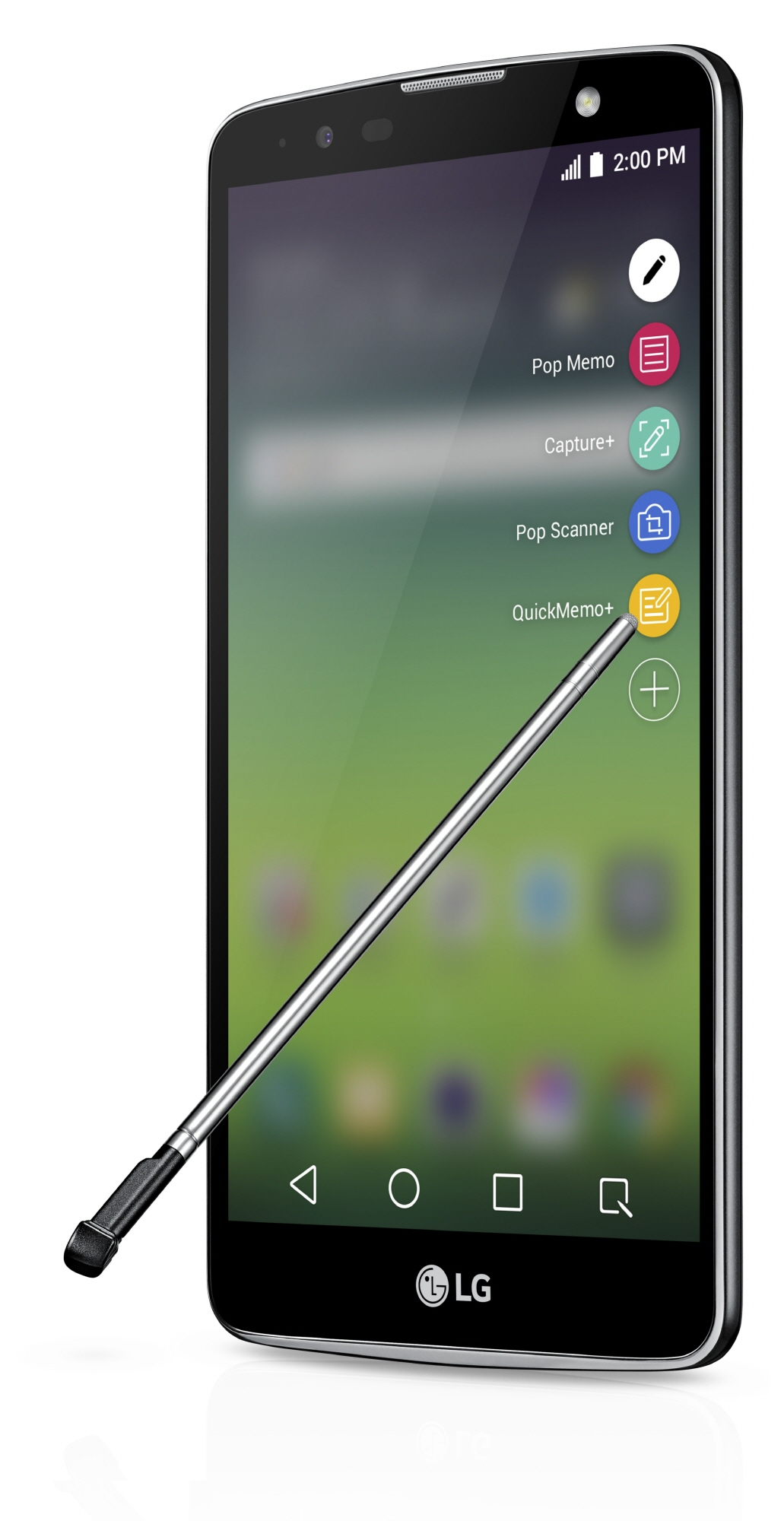 LG전자, ‘스타일러스2 플러스’ 글로벌 출시 ■ 풀HD 디스플레이, 옥타코어 프로세서로 화질과 속도 향상 ■ 후면 카메라 1,600만 화소로 높이고 전면에 플래시 추가 ※ Social LG전자 ( 에서 관련 보도자료를 확인하실 수 있습니다.